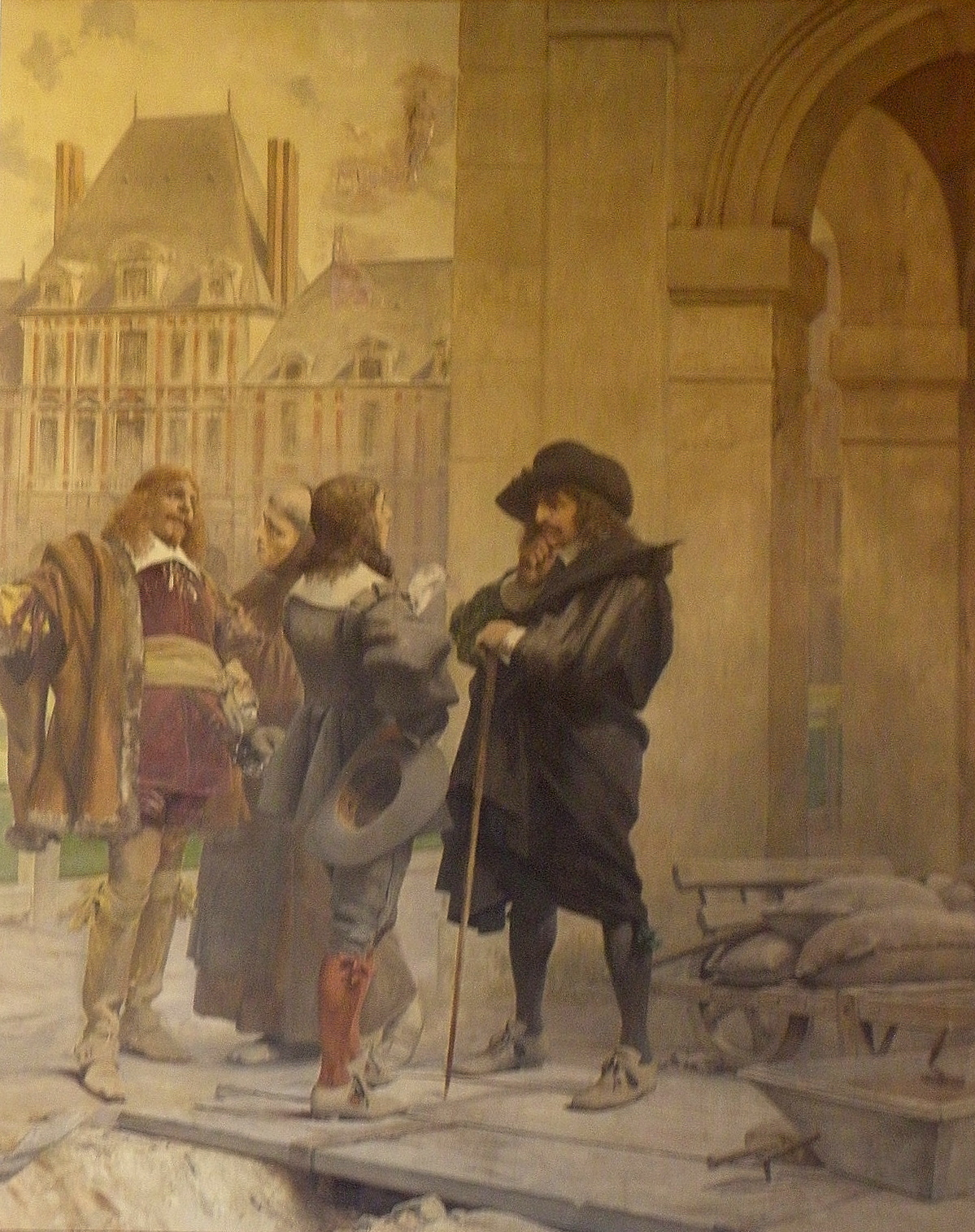 Péristyle de La Sorbonne, Paris (75005). Peinture murale. Descartes et Pascal.